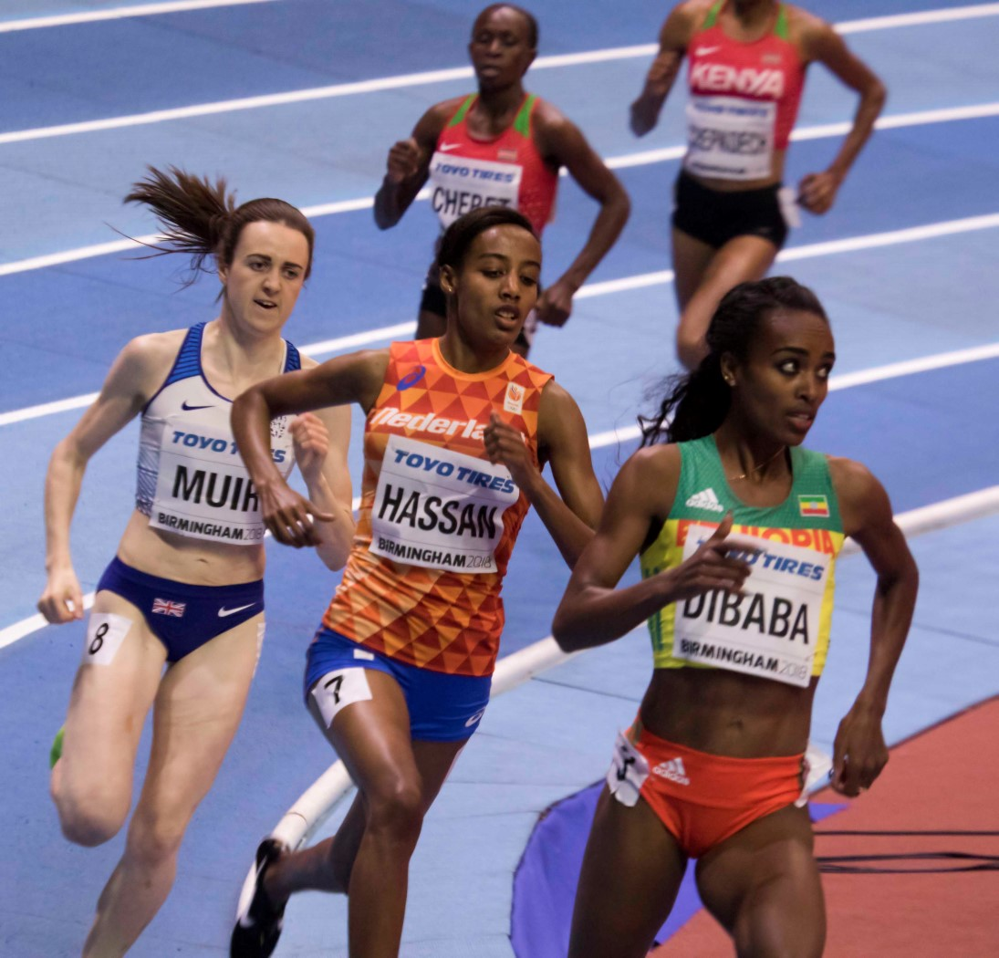 WK3B0299 1500m finale dames